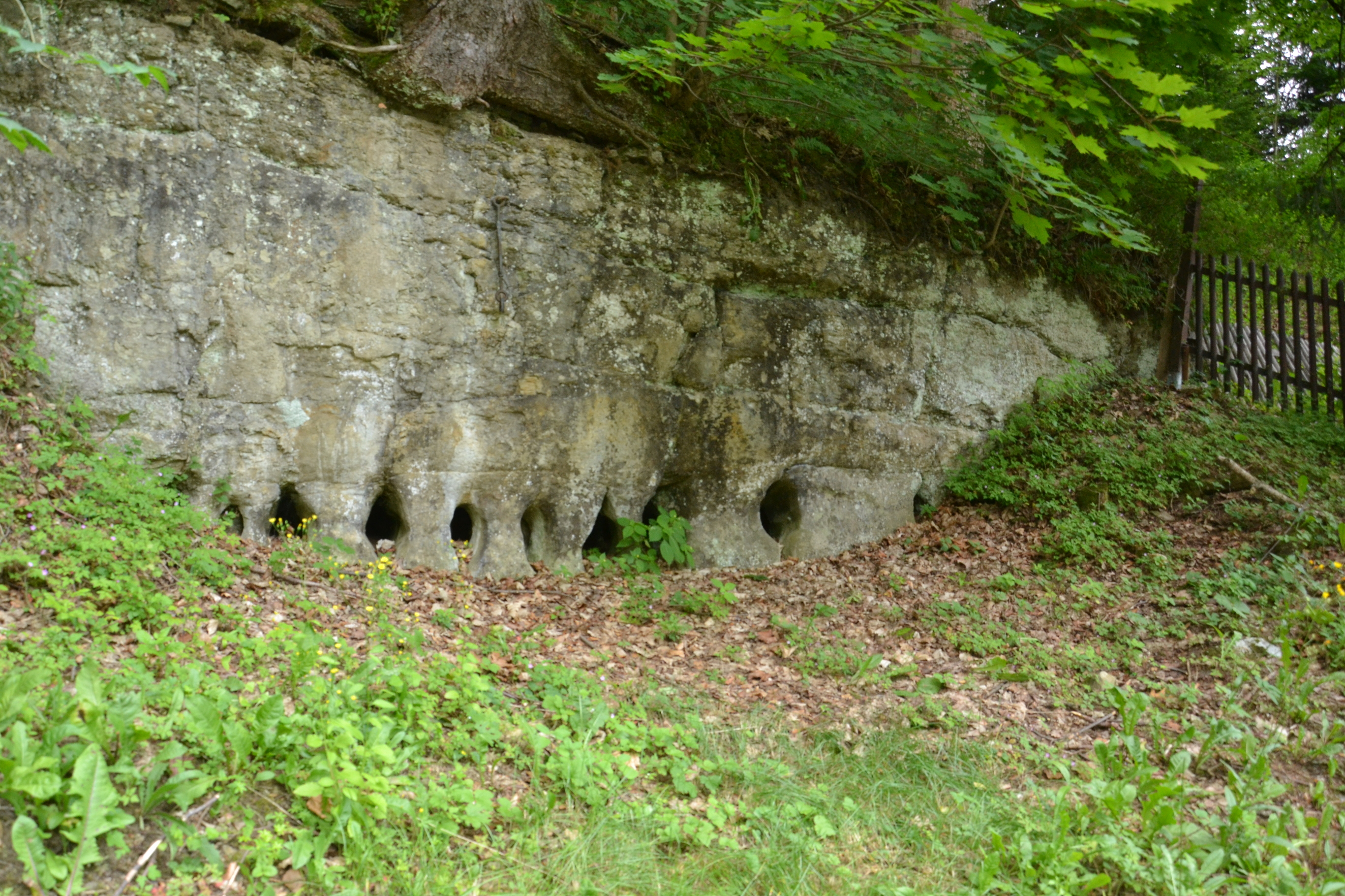 Skalní sloupky odkryté při stavbě silnice